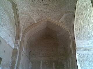 نمای مقبره علامه شهرستانی